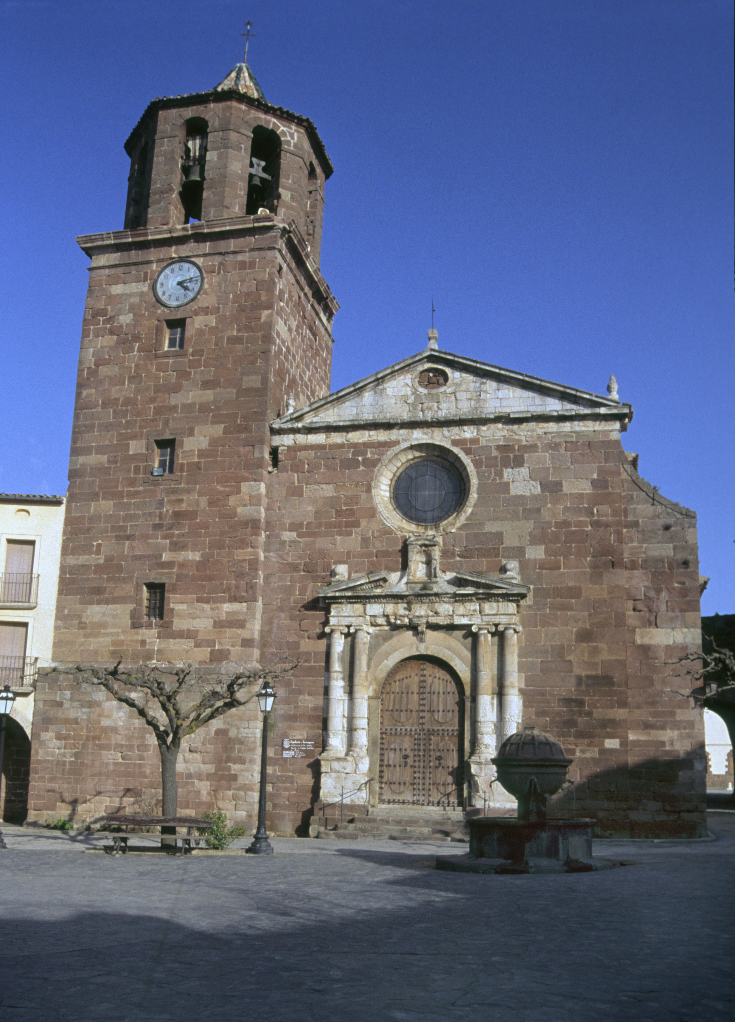 Façana de l'església parroquial de Santa Maria de Prades (Baix Camp)